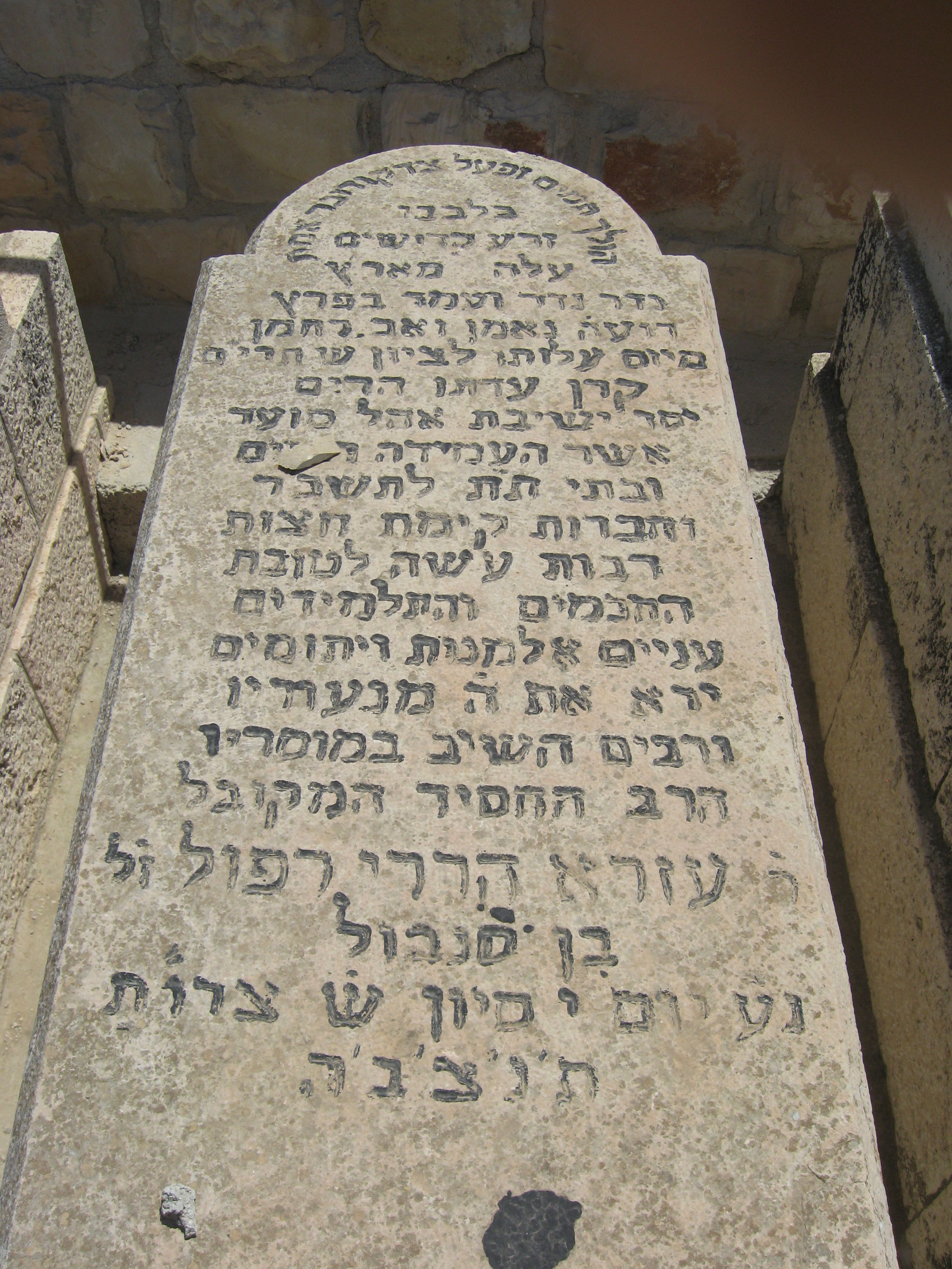 קברו של הרב עזרא הררי רפול בחלקה הספרדית בהר הזיתים